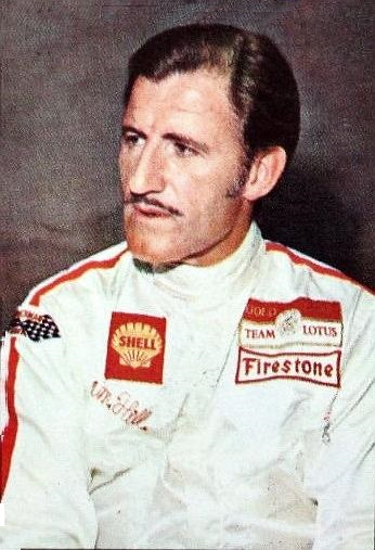 Graham Hill en 1969 - Campioni dello Sport 1969-1970, n°112